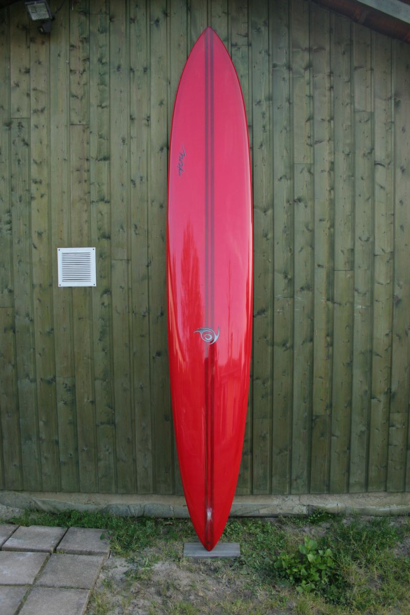 Pipeline Rhio Chaser 10'6 , photo kami